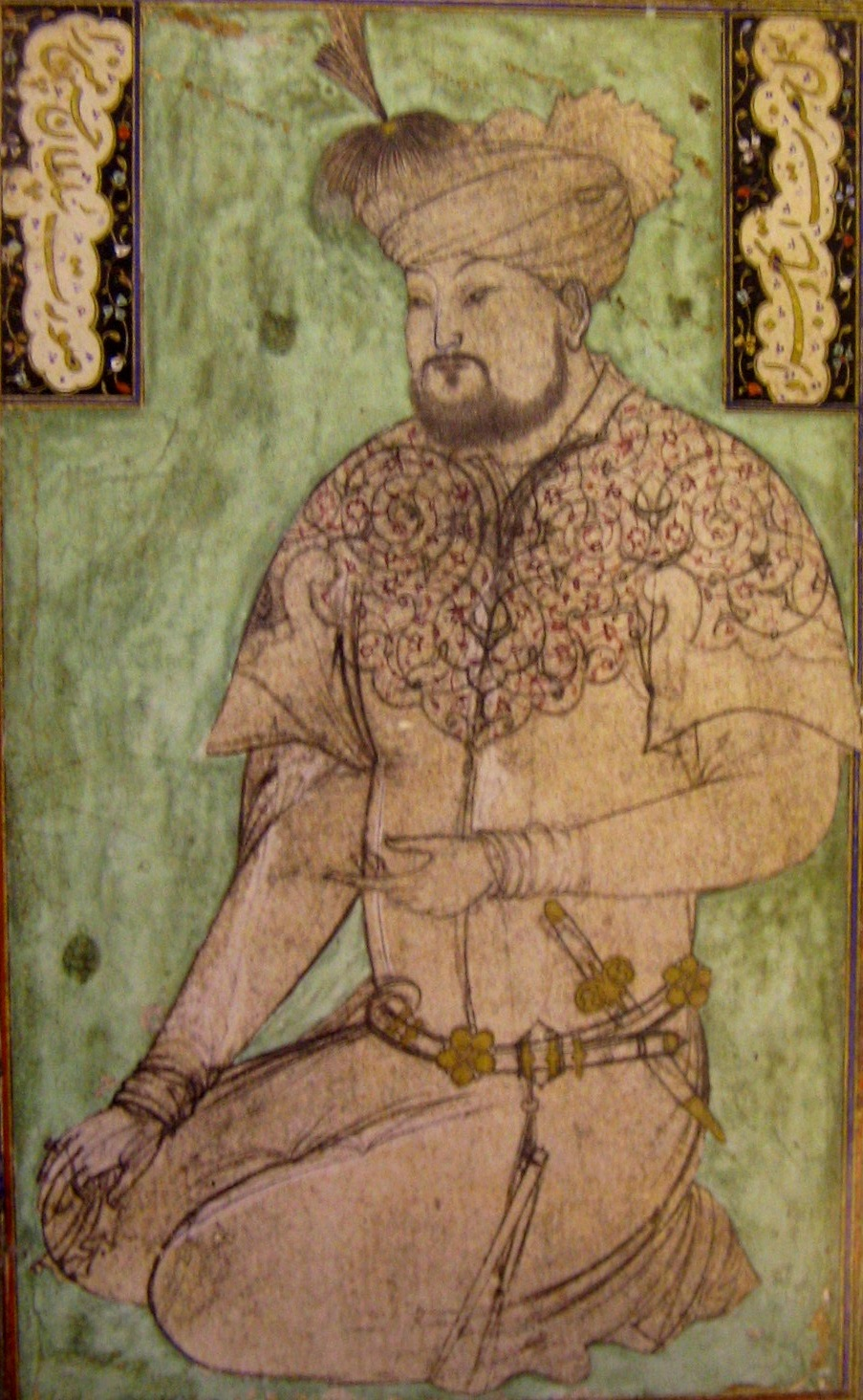 Портрет султана Хусейна Байкары, 1490-е годы